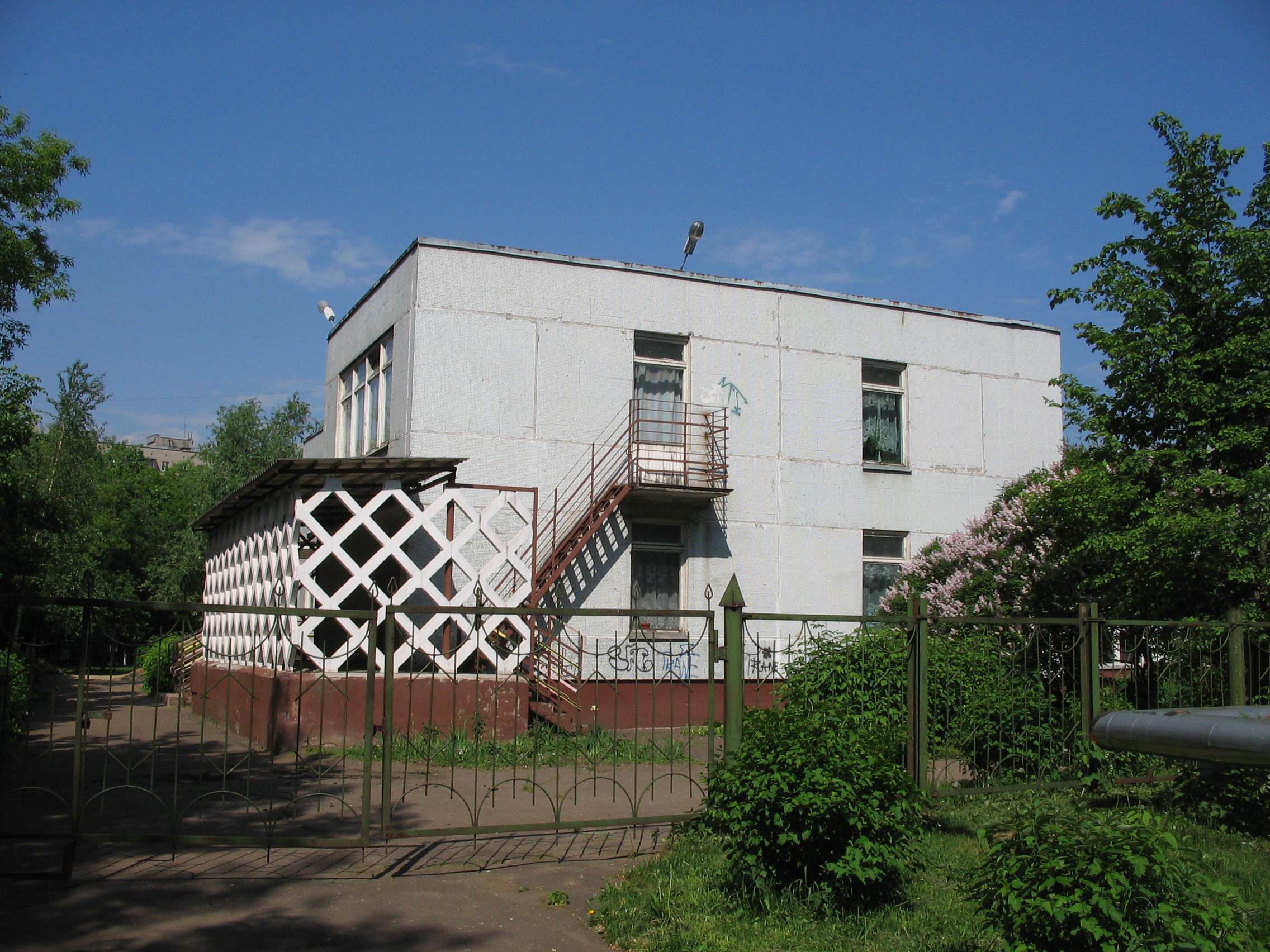 Город Реутов. Один из корпусов детского сада № 19 «Сказка».